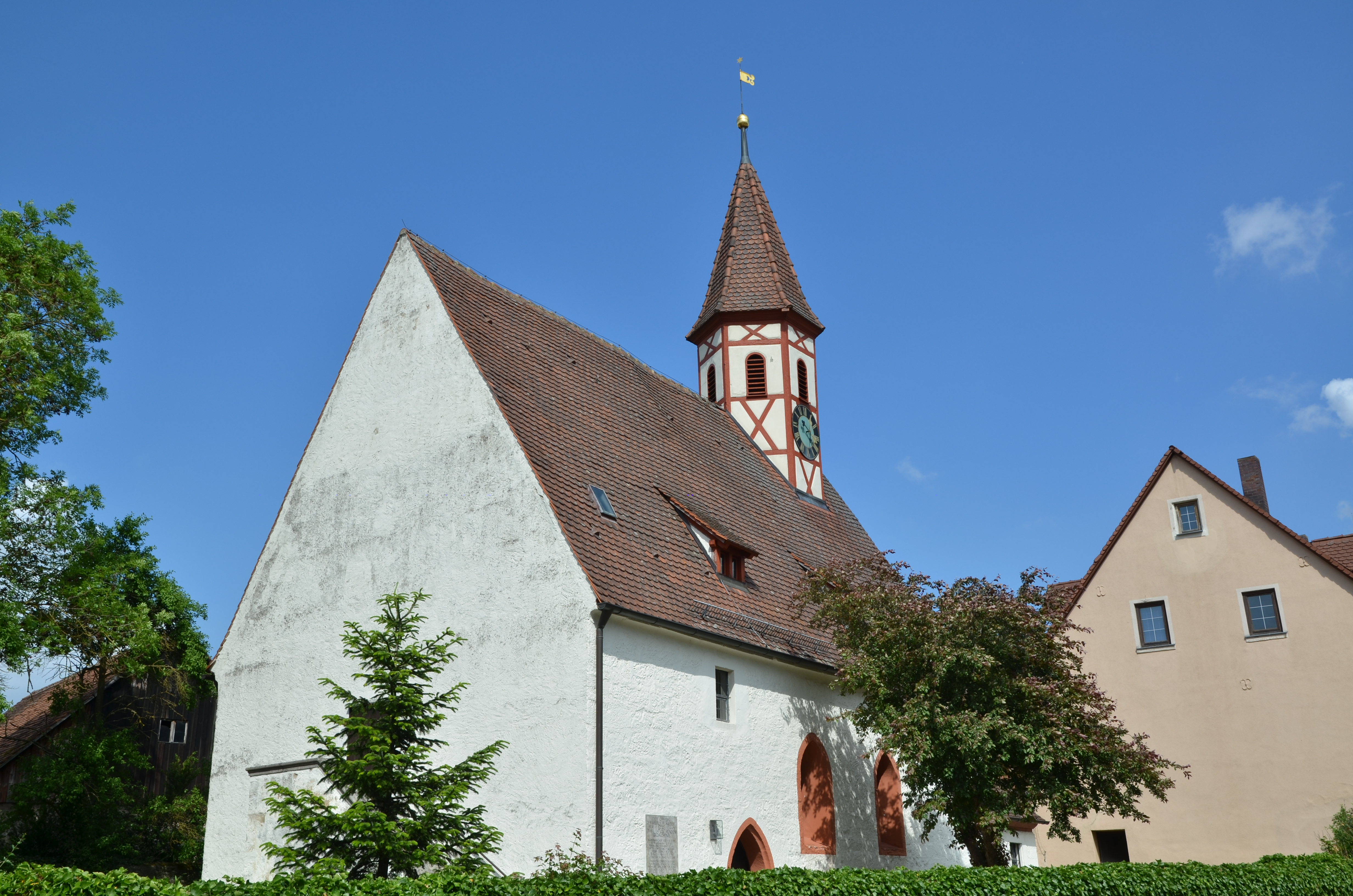 evang.-luth. Kirche in Hirschneuses